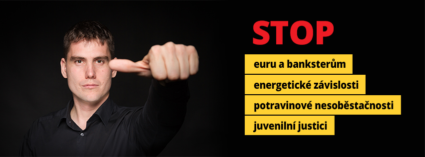 ČSNS: 4 programové body Eurovolby 2014